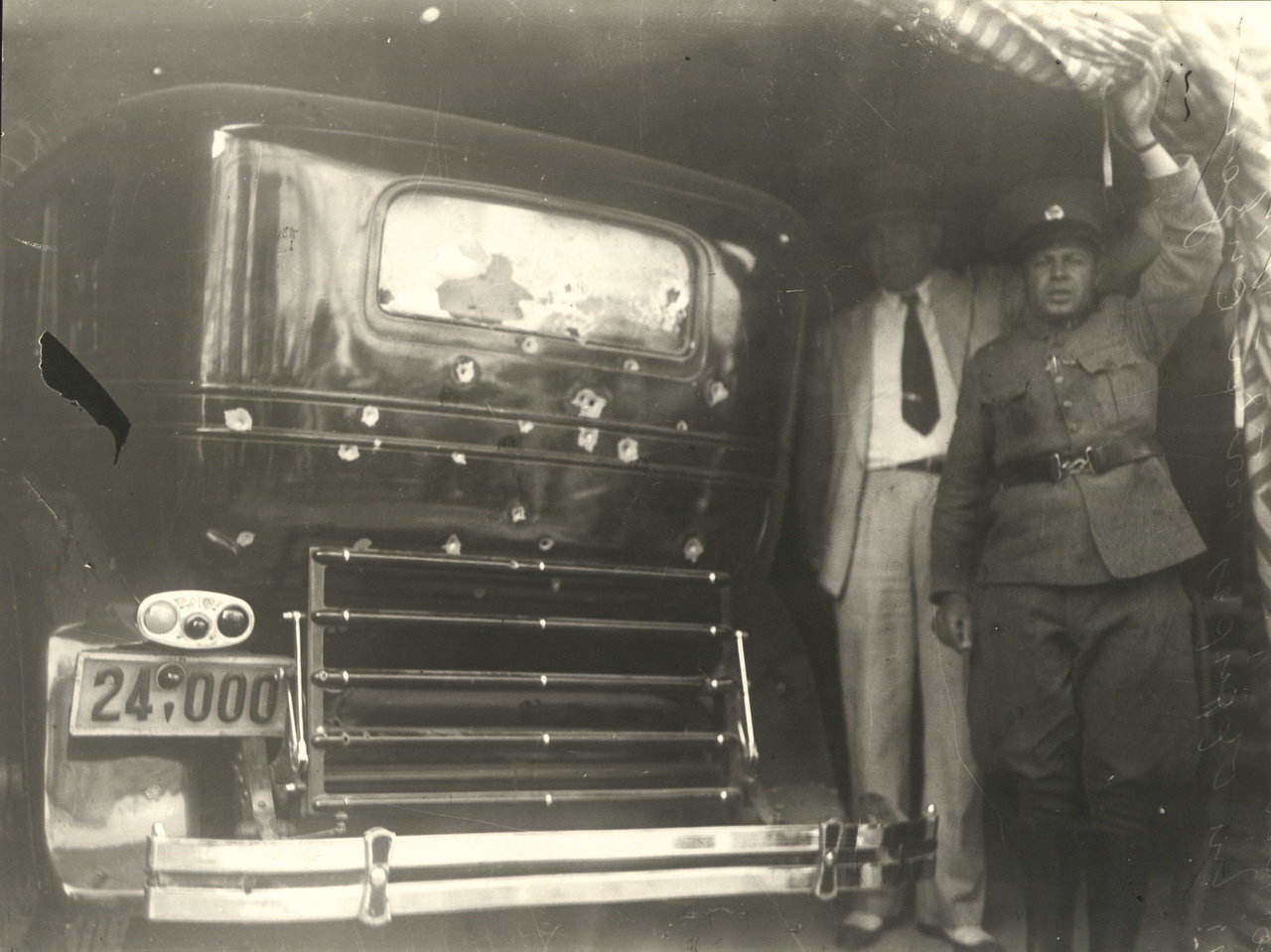 Το αυτοκίνητο του Ελ. Βενιζέλου διάτρητο από σφαίρες αμέσως μετά την απόπειρα της λεωφ. Κηφισίας το 1933.